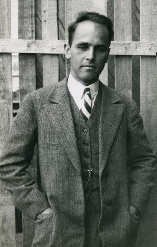 Olympische spelen Los Angeles 1932. De roeier Roelofsen maakt deel uit van de Nederlandse Olympische roeiploeg.